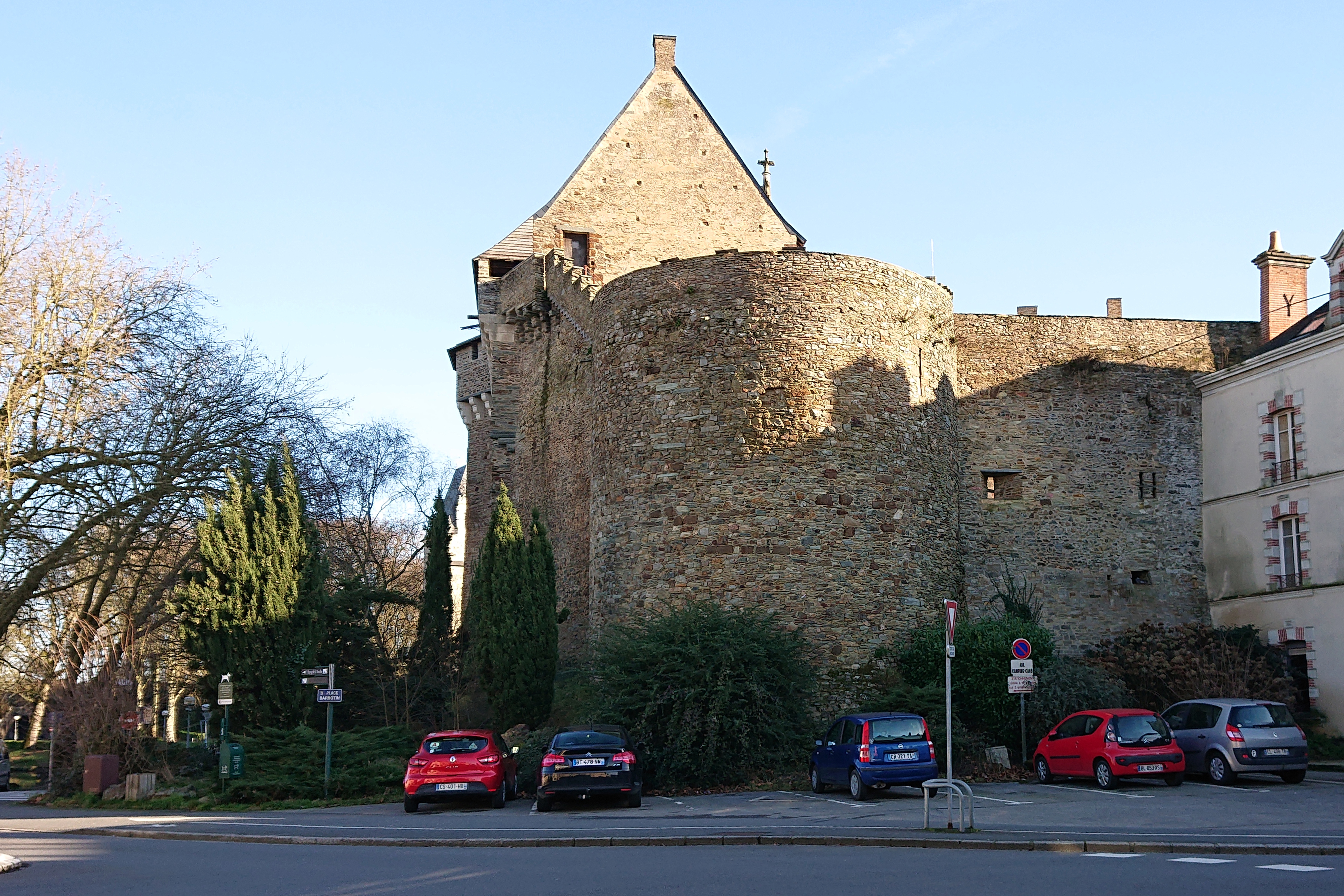 Tour de la Torche, Château de Châteaubriant, France.